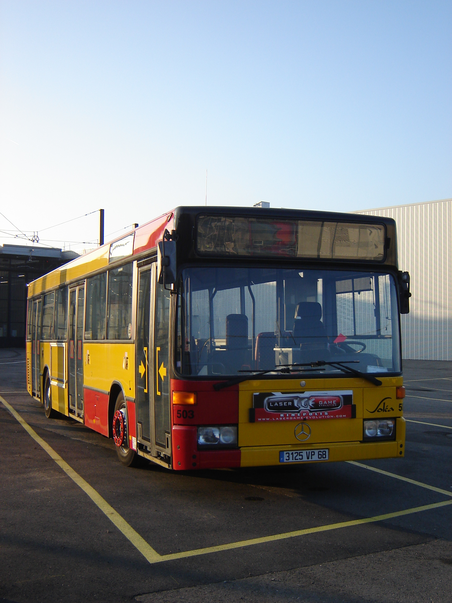 O 405 N SOLEA